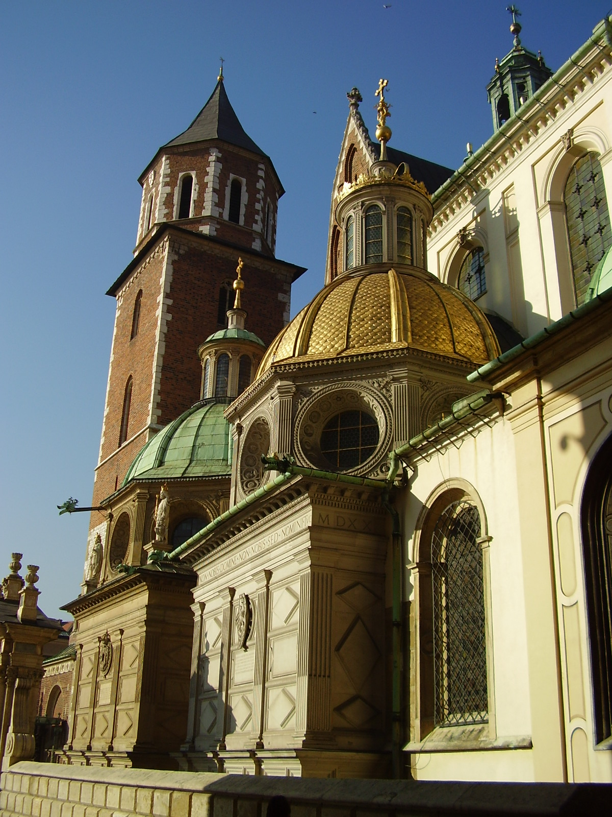 Krakow